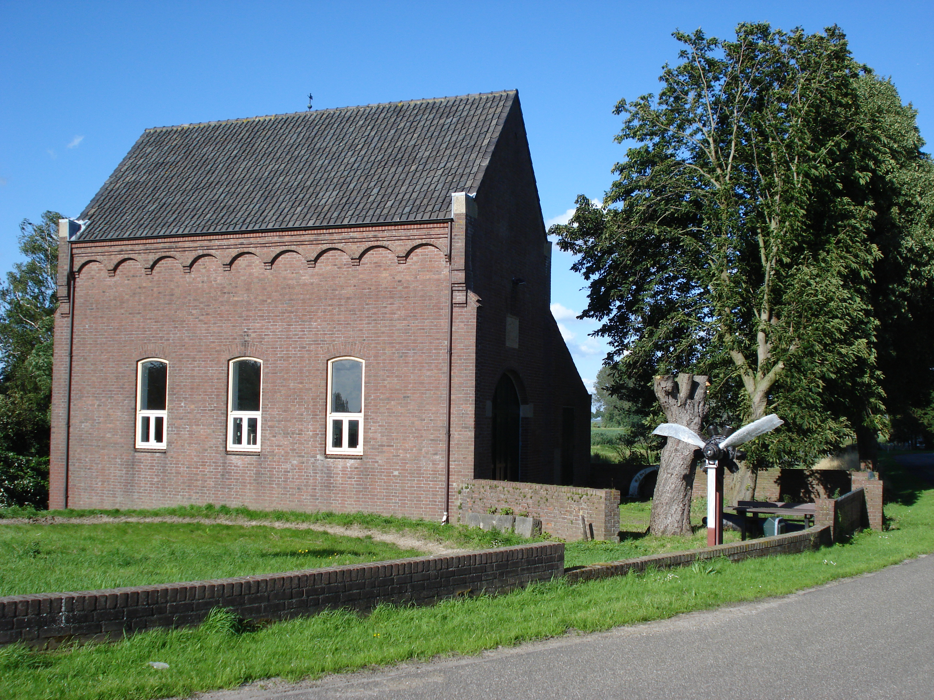 Hertogswetering, ancien station de pompage Hertogsgemaal à Gewande